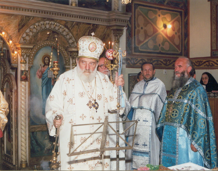 Моја слика! Направљена је током прославе црквене славе, Светих Јоакима и Ане, цркве у Прељини. Снимак је направљен 22. септембра 1996. године.